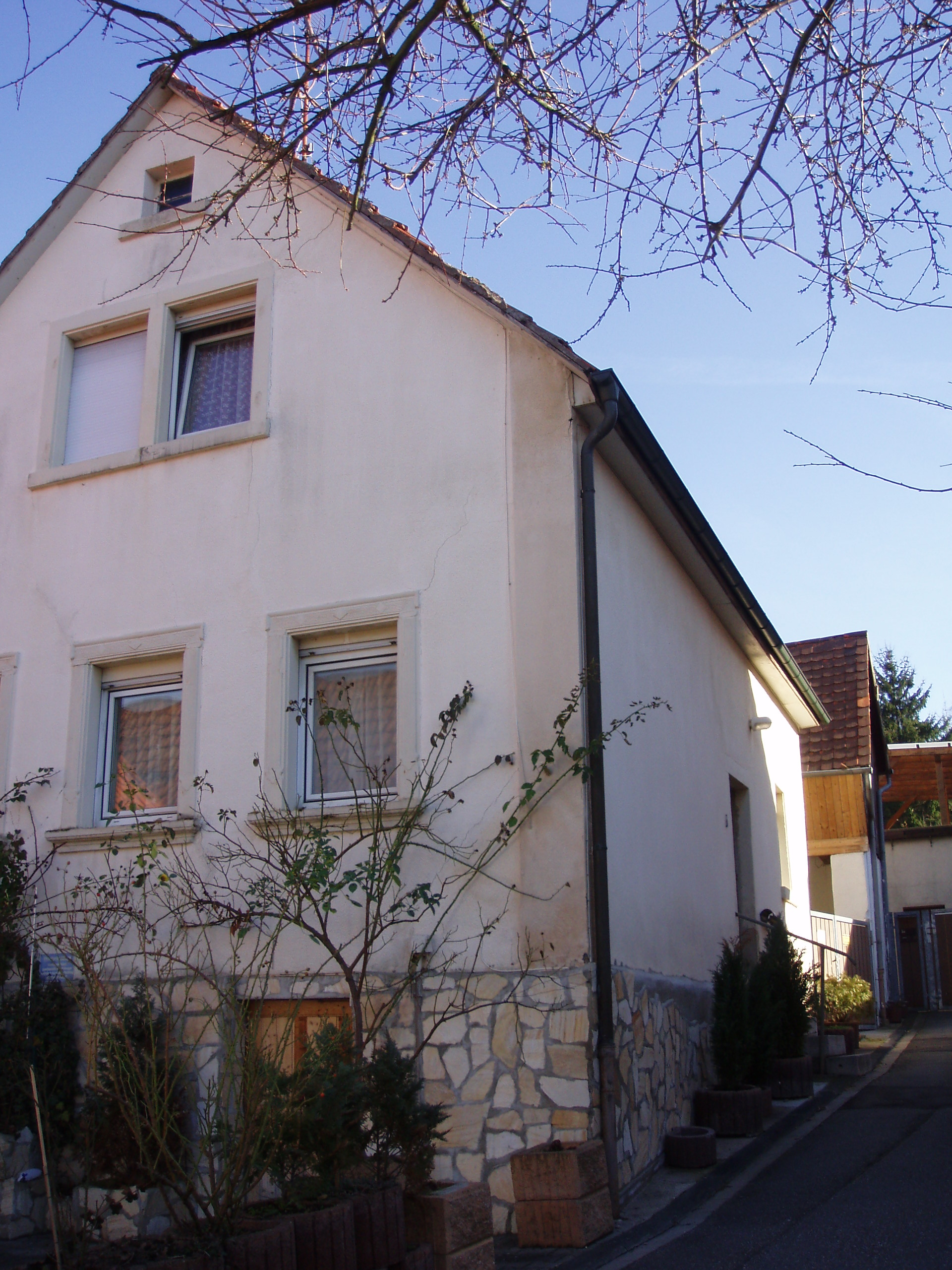 Standort der ehemaligen Synagoge Untergrombach